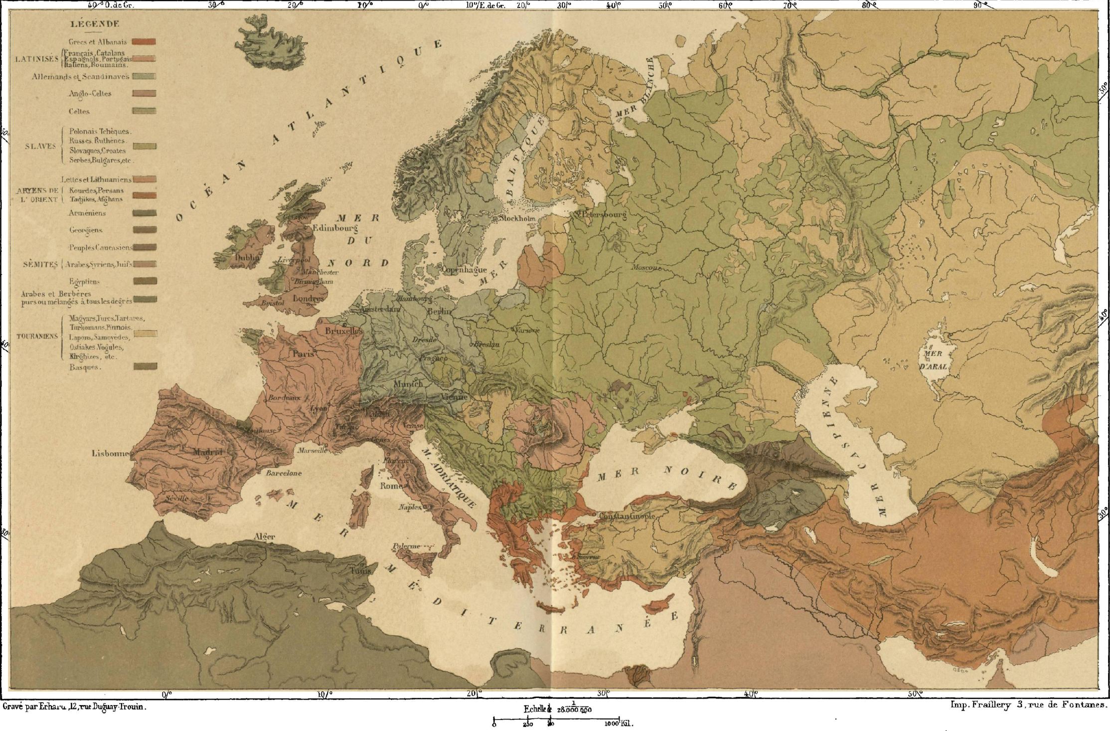 Illustration du tome 1 de Nouvelle géographie Universelle d'Élisée Reclus, publié en 1879